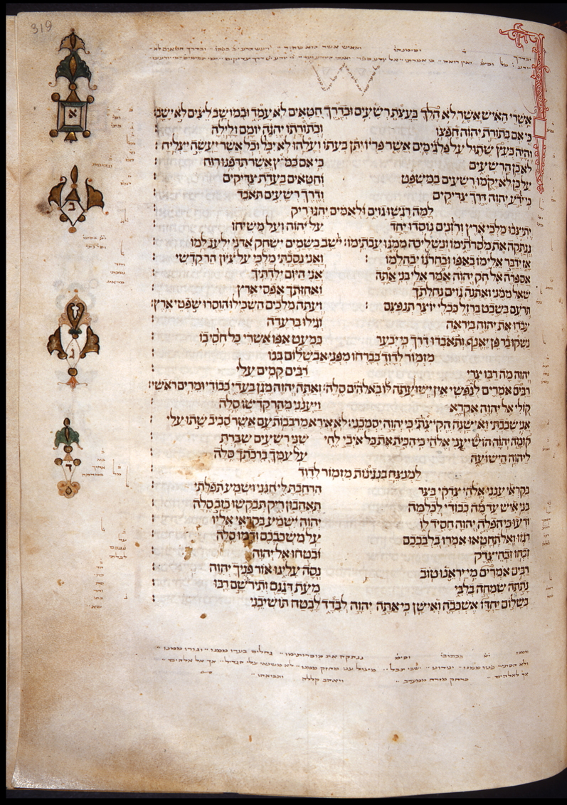 Bíblia de Cervera, Salmos (fl 319)